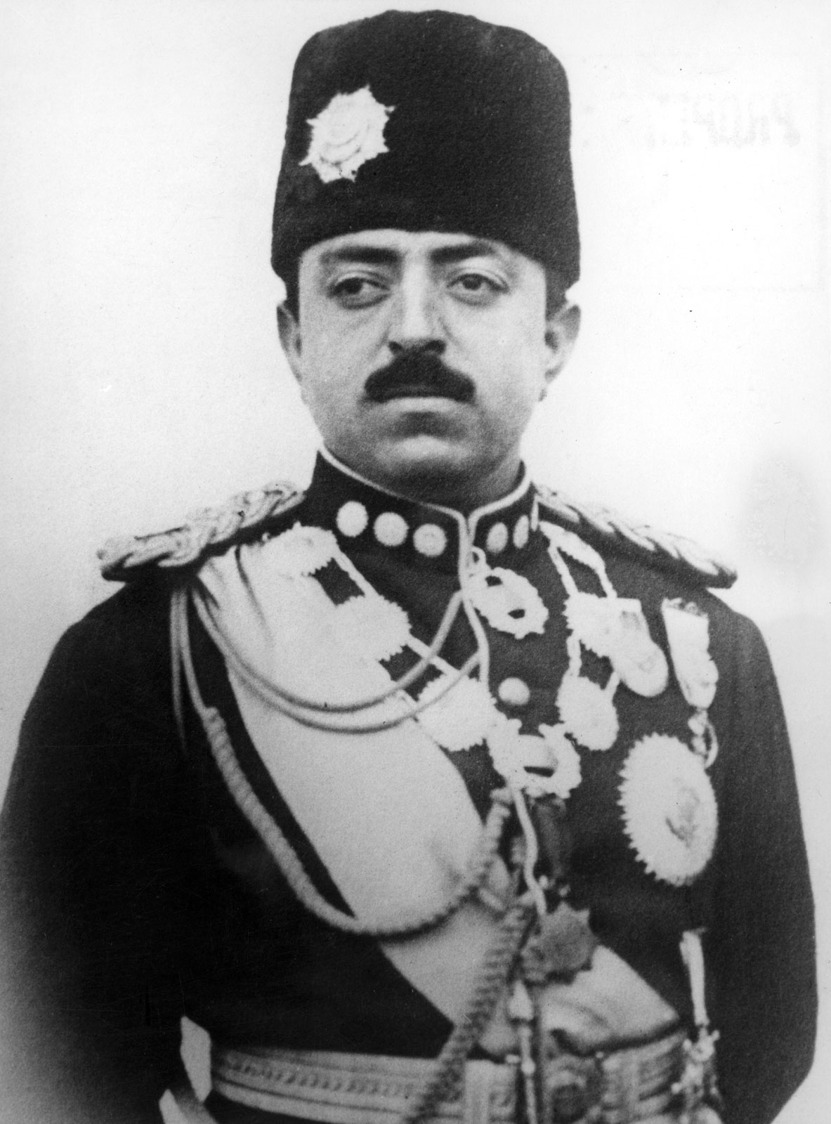 King Amanullah Khan of Afghanistan